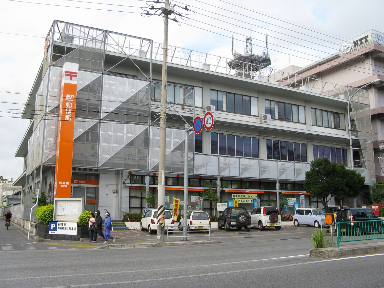 那覇東郵便局 2008年6月24日 Bakkai撮影